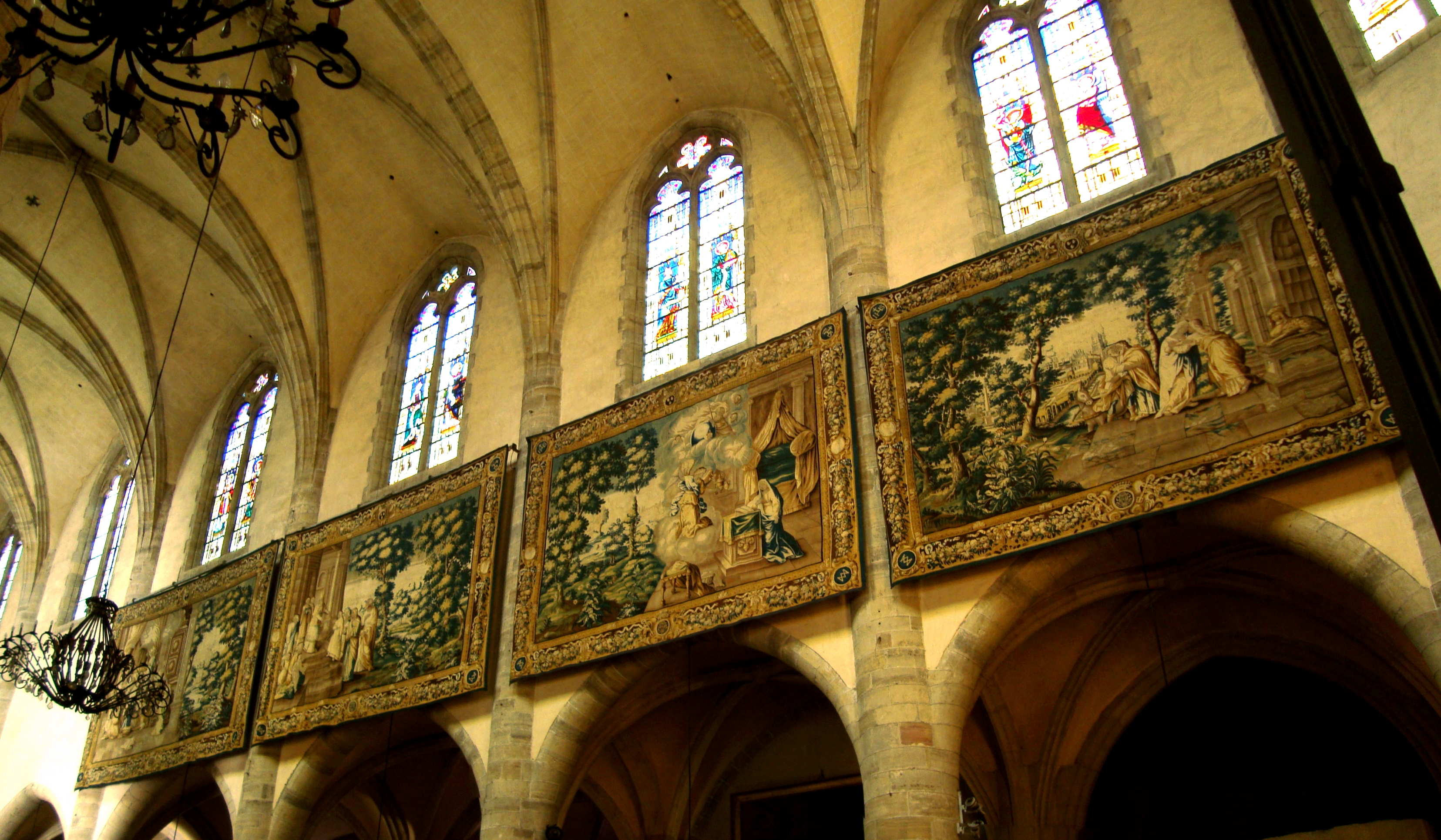 Les tapisseries Scènes de la vie de la Vierge dans la cathédrale saint Privat de Mende (Lozère, France).